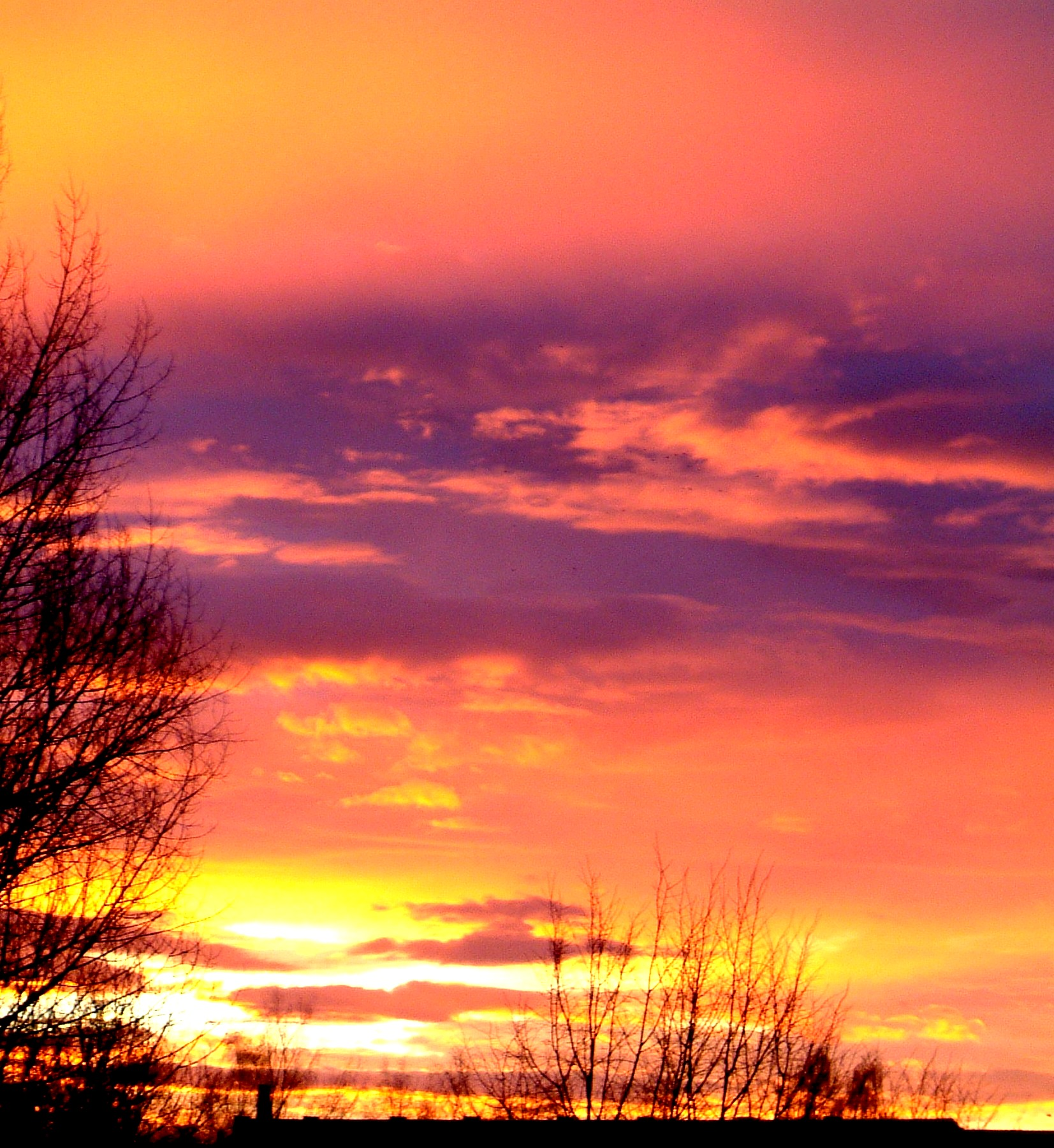 Morgenröte_über_Chemnitz_6-12-2006.